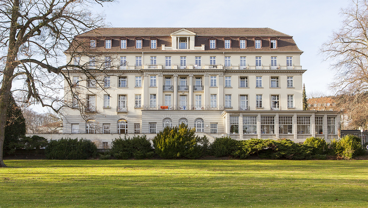 Hotel Fürstenhof am Kurpark Bad Eilsen, Landkreis Schaumburg, Niedersachsen